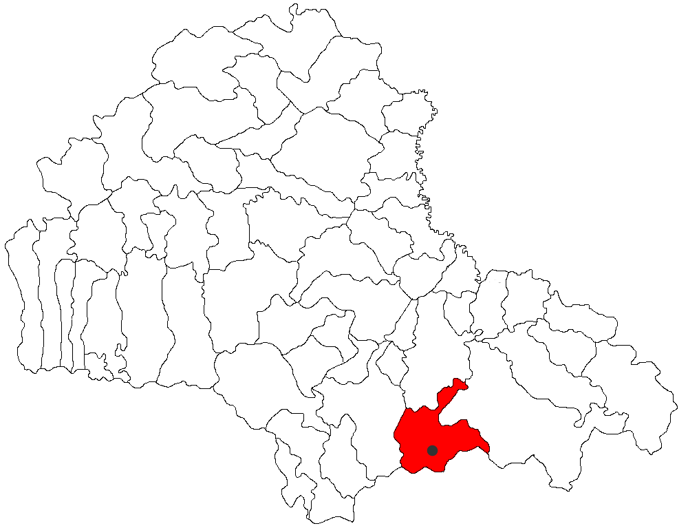 Categorie:Hărţi ale judeţului Braşov